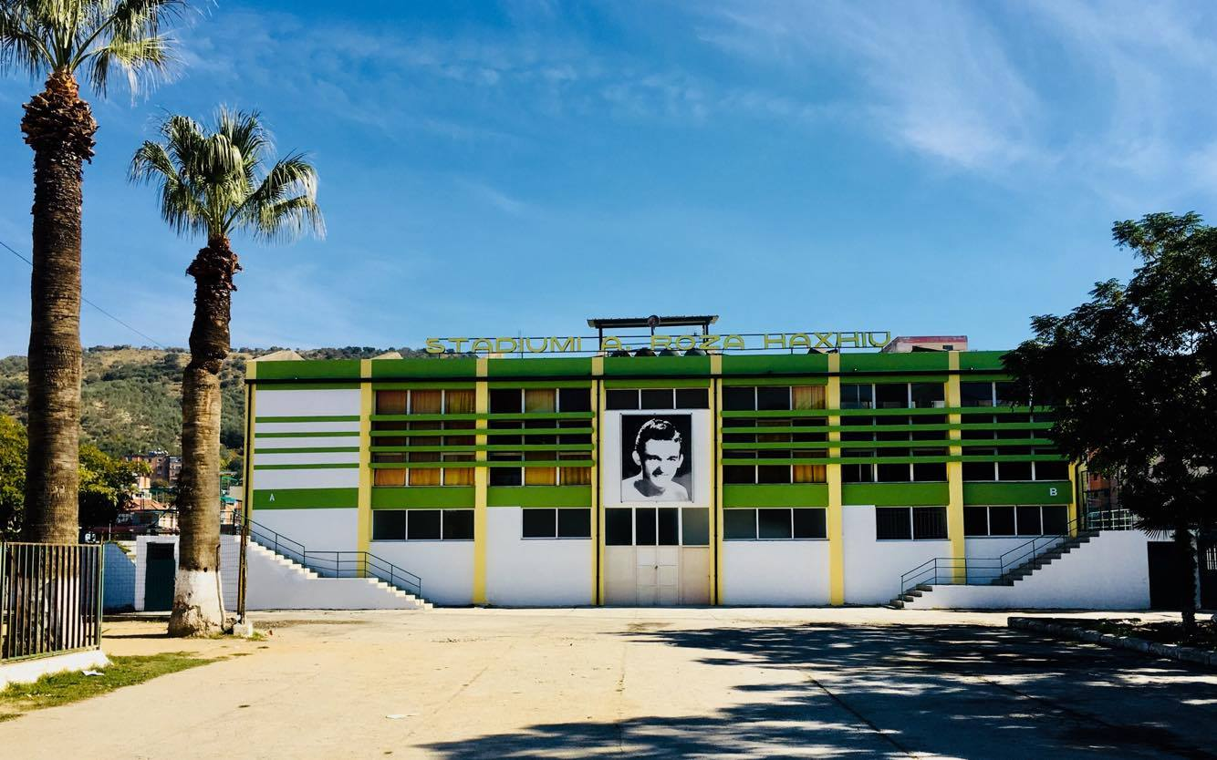 Stadiumi i Lushnjes “A.Roza Haxhiu”